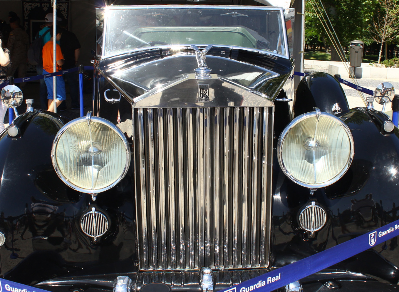 Detalle del radiador de un Rolls-Royce Phantom IV, chasis 4AF18